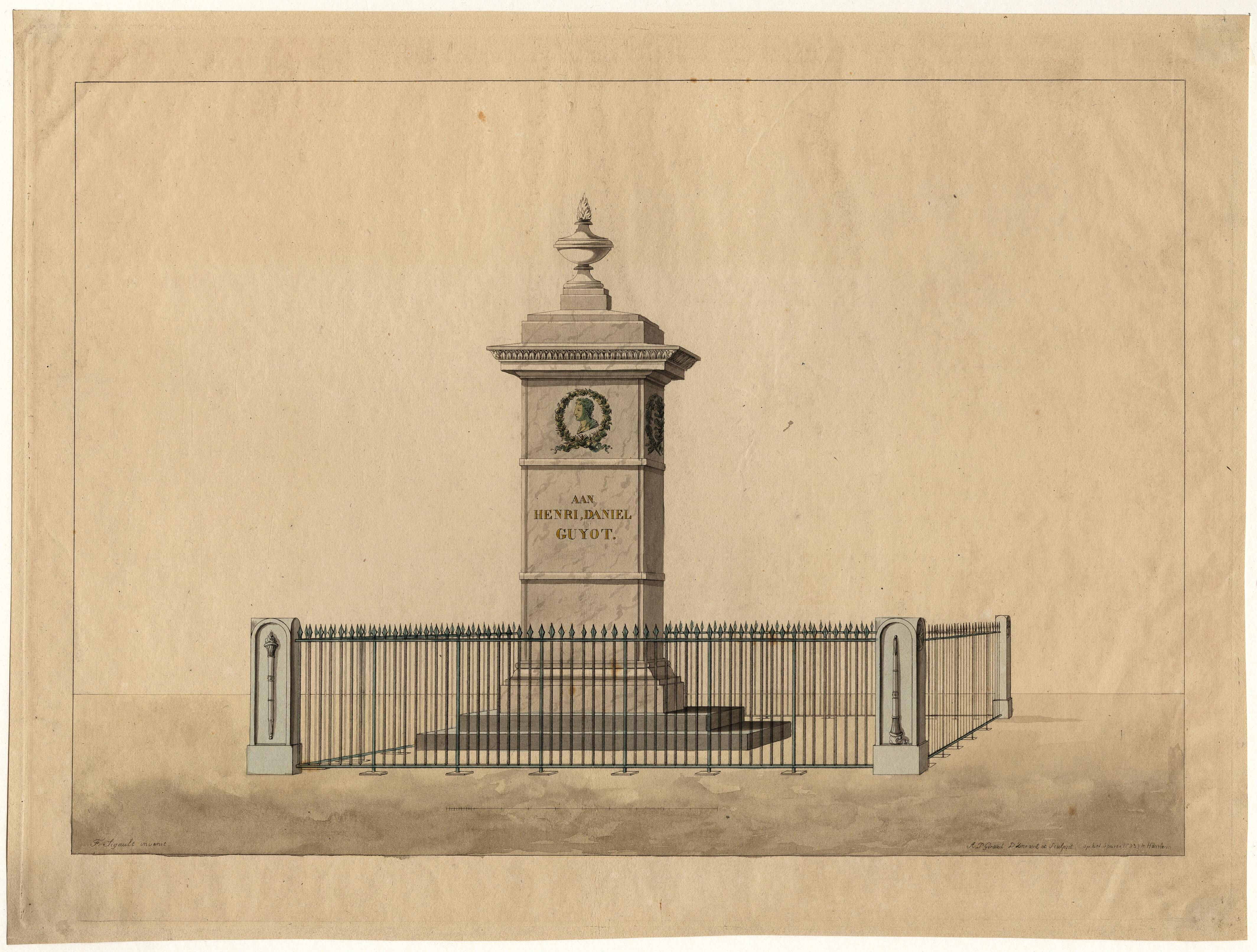 monument, tekening door F. Sigault in bezit van Rijksdienst voor de Monumentenzorg